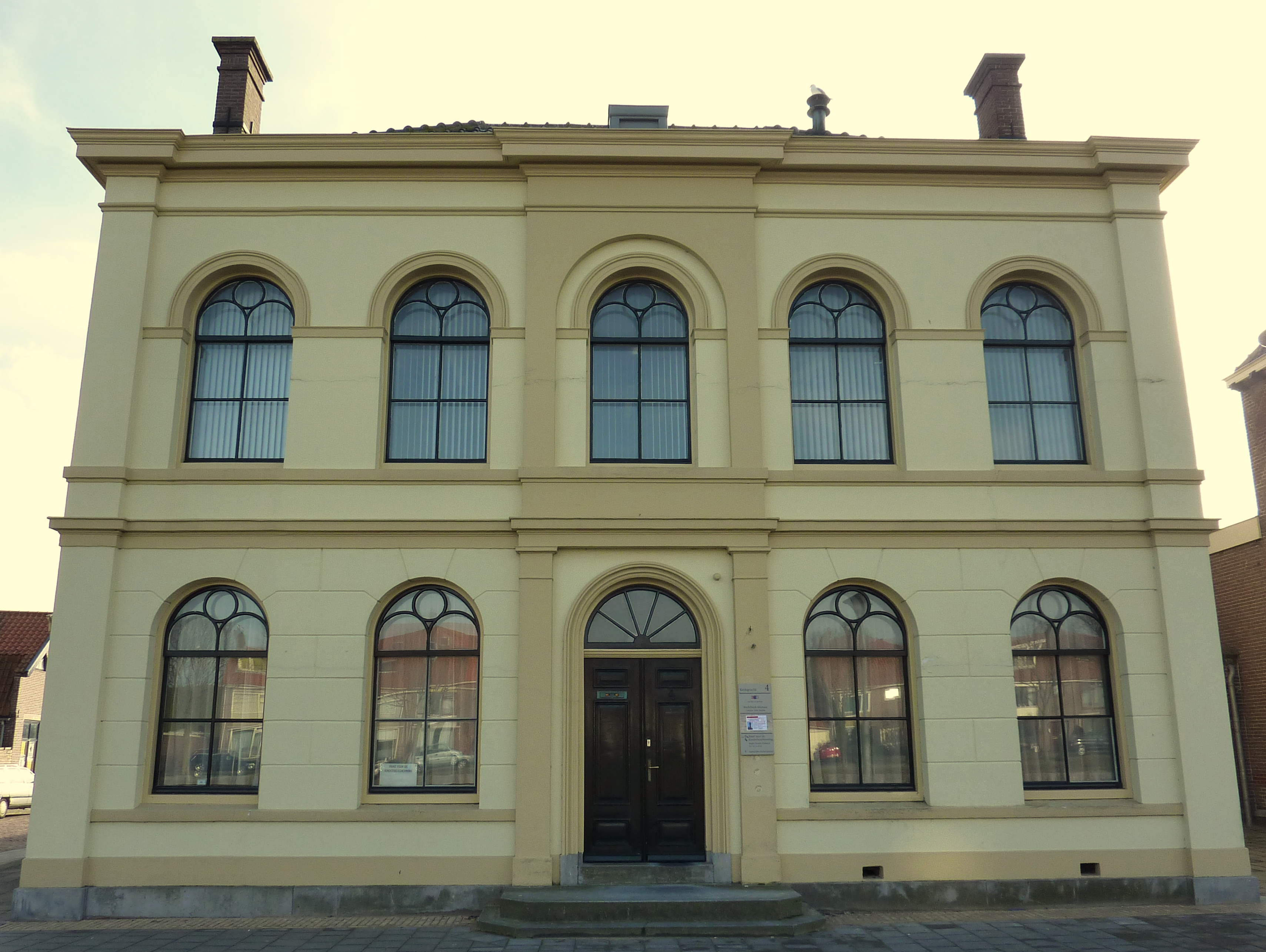 Den Helder